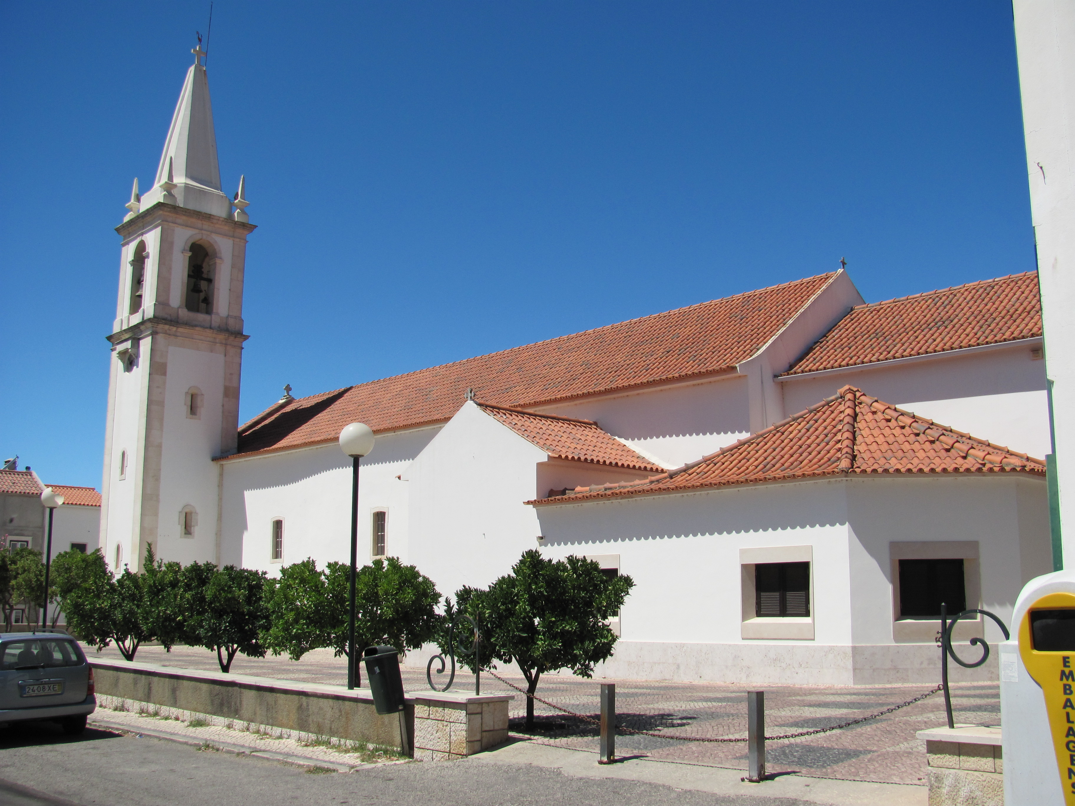 Photographie de l'église Notre Dame de La Cage, Cortes, Leiria.